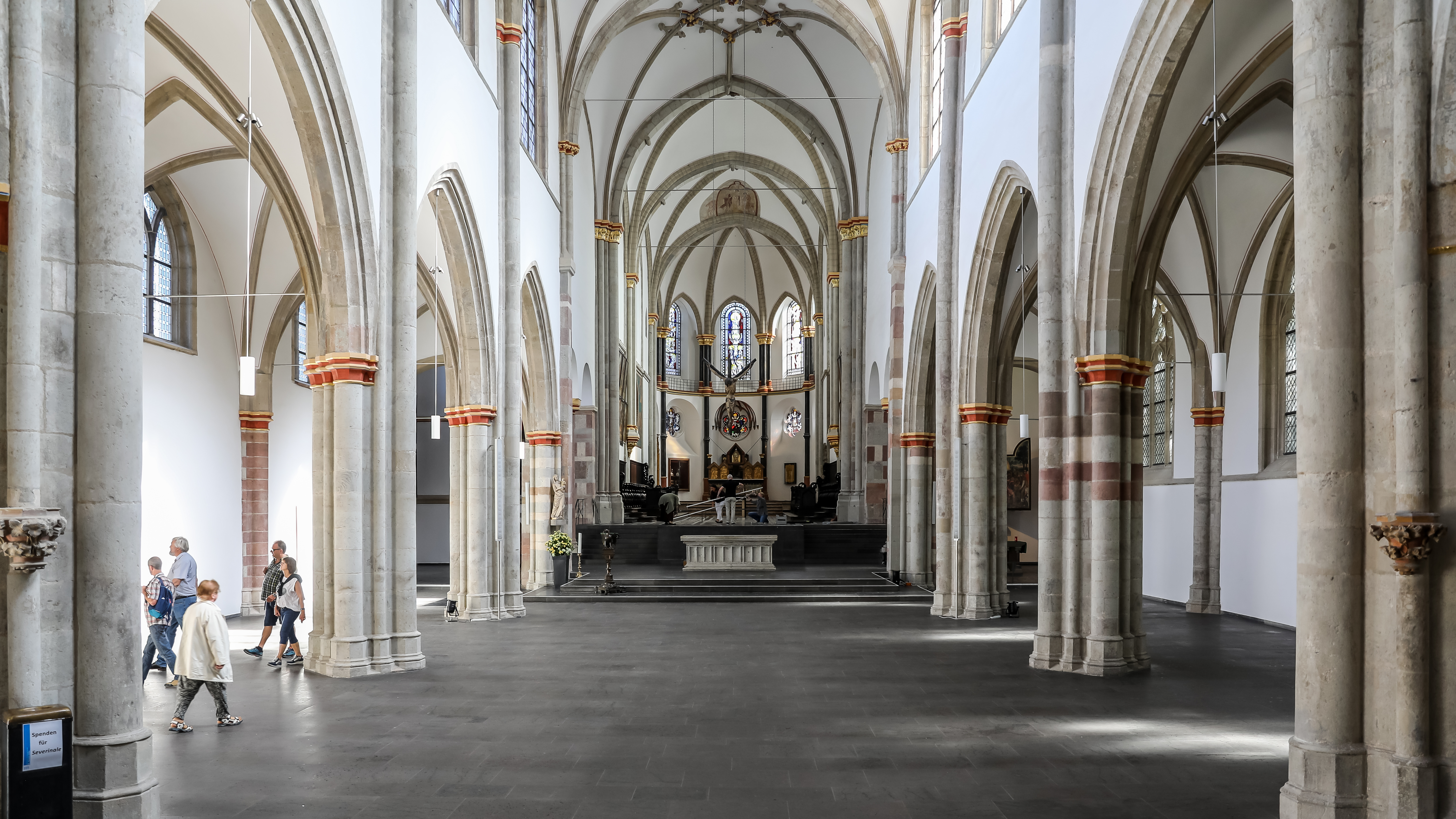 St. Severin Köln - Blick durch das Langhaus ohne Kirchenbänke